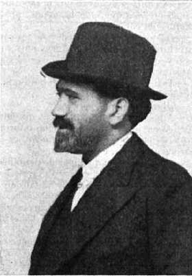 Fotografía del escritor español Vicente Castro Les publicada en 1912, cuando era vicepresidente de la Asociación de Propaganda